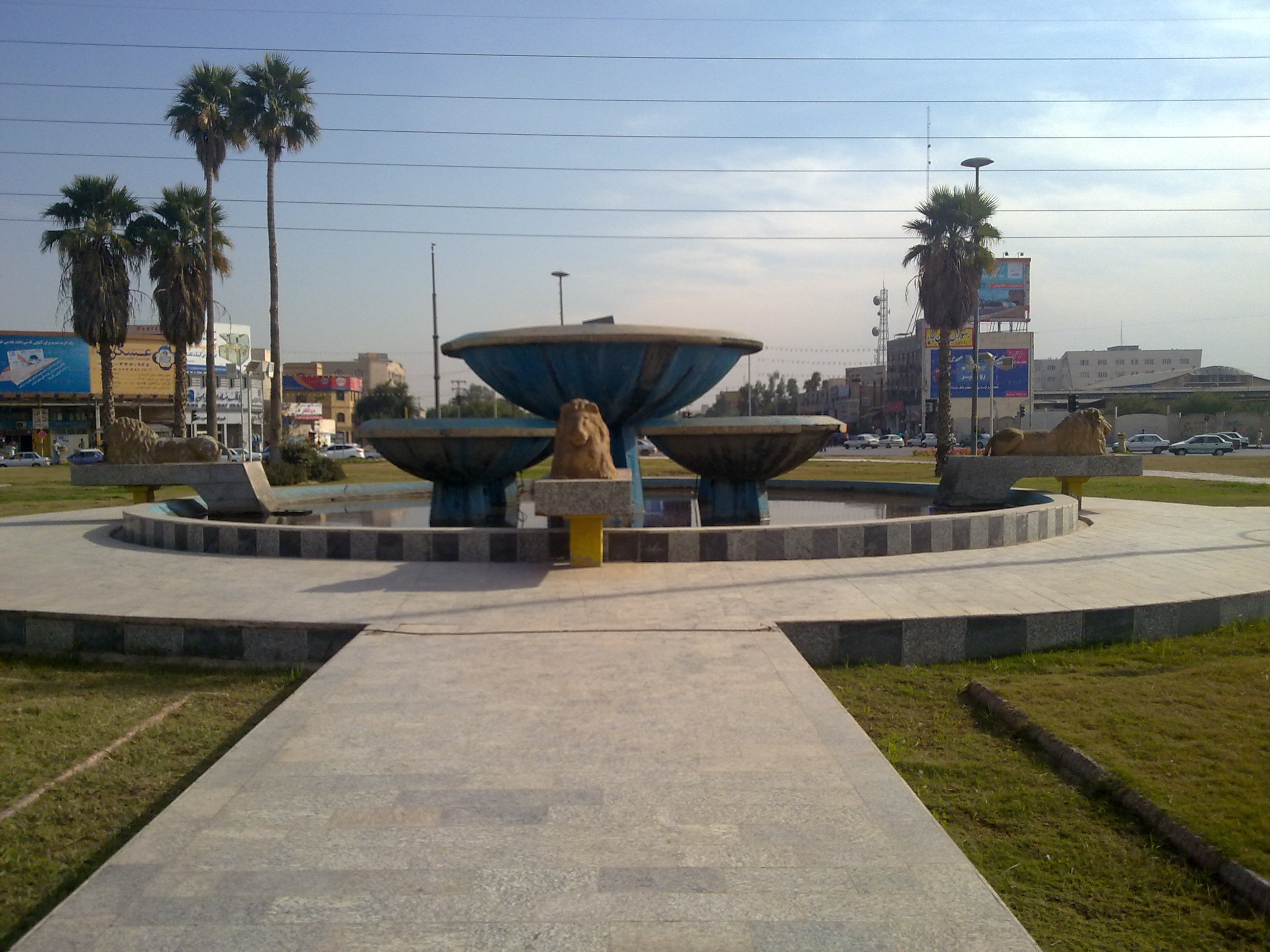 نمایی از میدان چهار شیر اهواز - در روزی که هوا صاف و تمیز بود